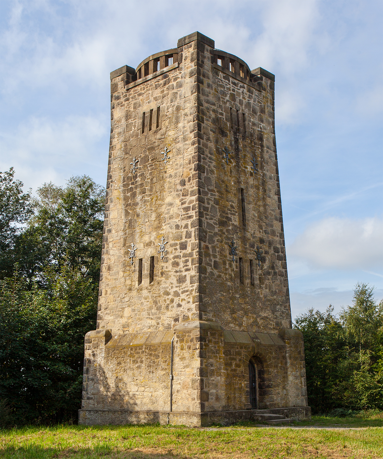 Bismarckturm Bad Salzuflen This is a photograph of an architectural monument.